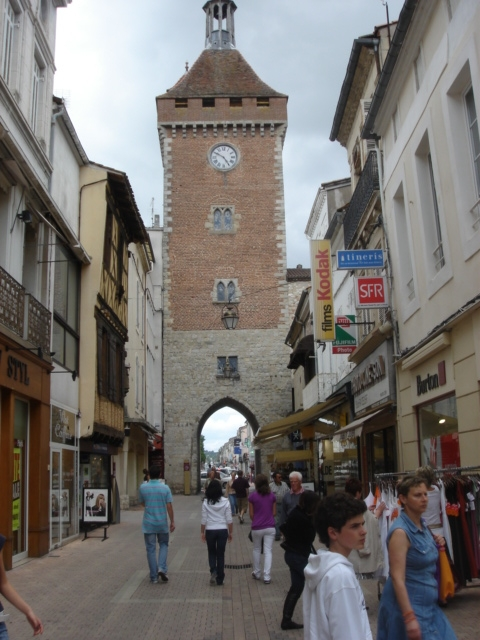 Rue conduisant à la porte du beffroi (porte de Paris) de Villeneuve-sur-Lot